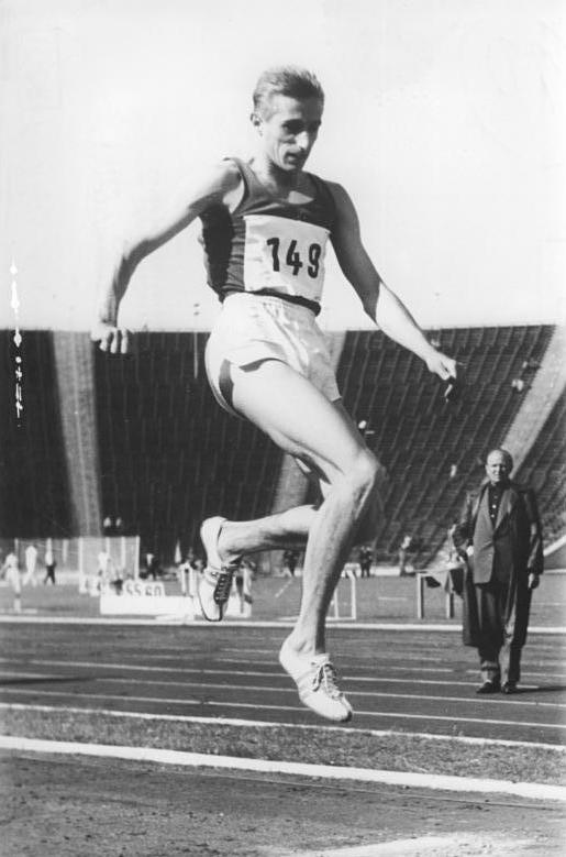 Karl Theirfelder Zentralbild Dressel 25.7.1960 Deutsche Leichtathletikmeisterschaften im Zentralstadion in Leipzig vom 22.- 24.07.1960 UBz: Deutscher Meister im Dreisprung wurde Karl Thierfelder.